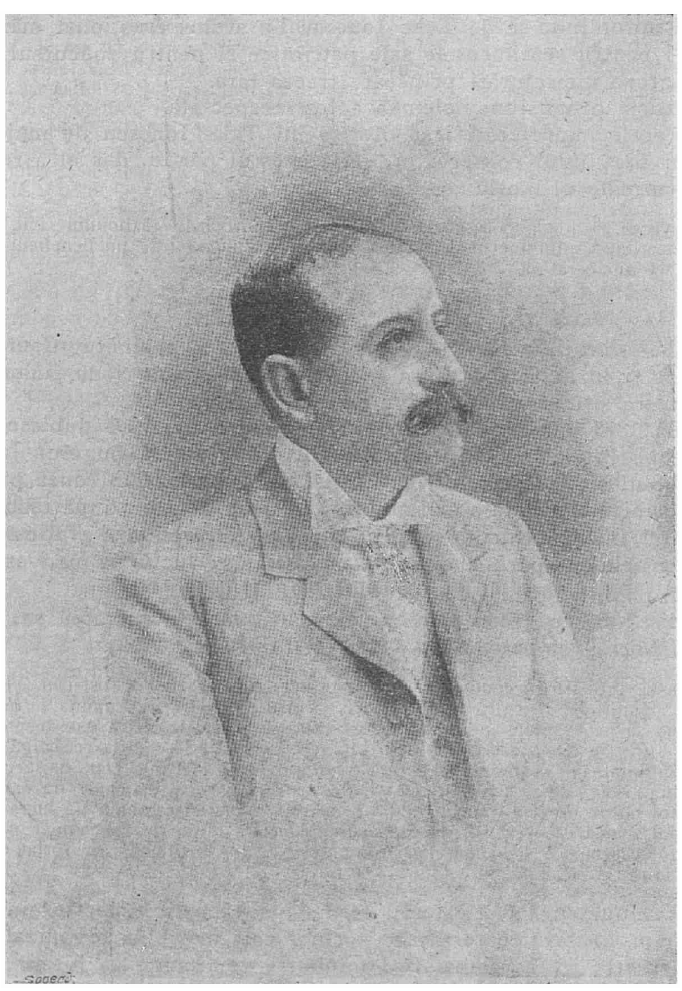 1898 - Take Ionescu la 40 ani